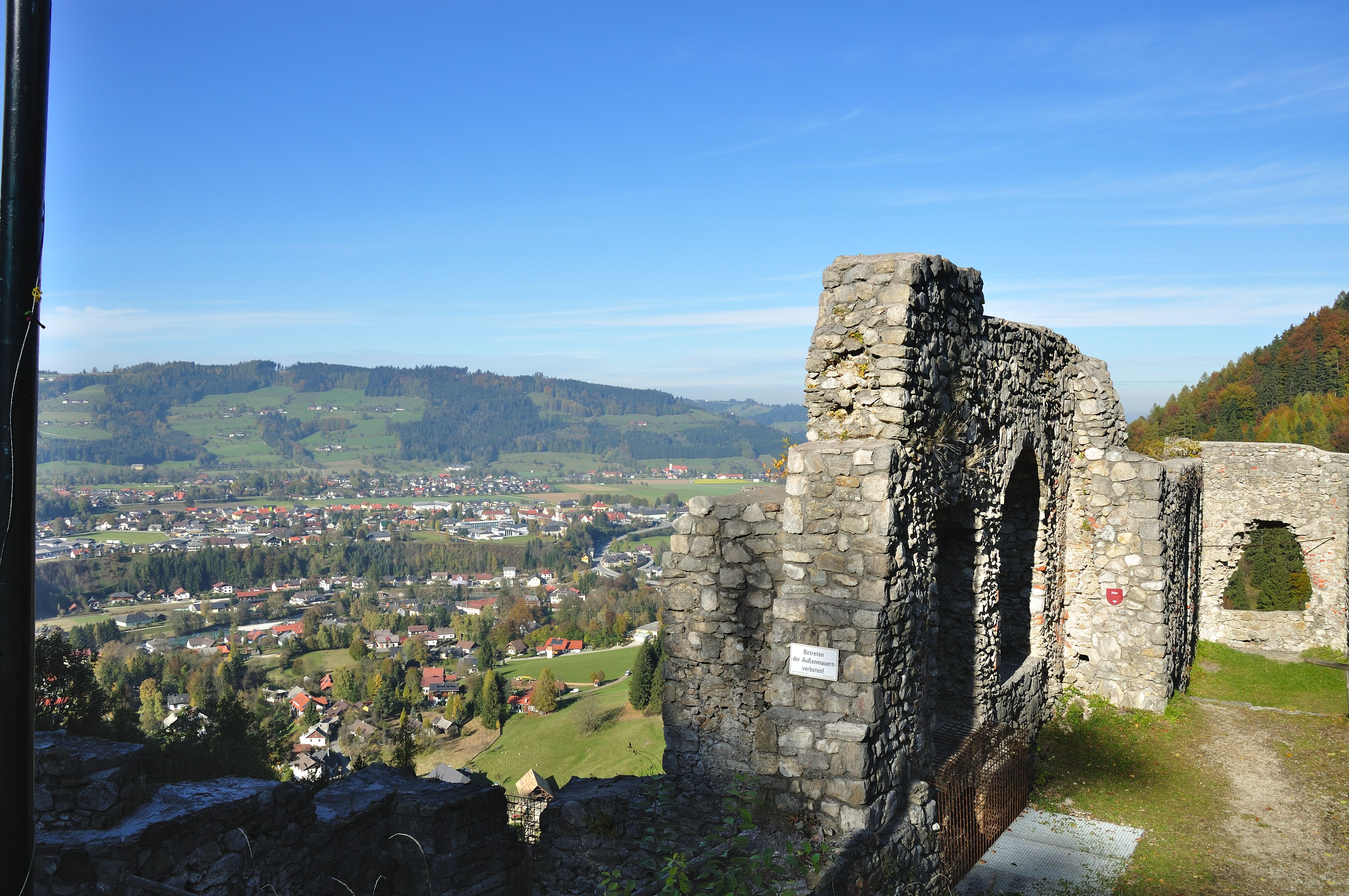 Teile der Ruine auf dem Grundstück Viechtwang Nr.941